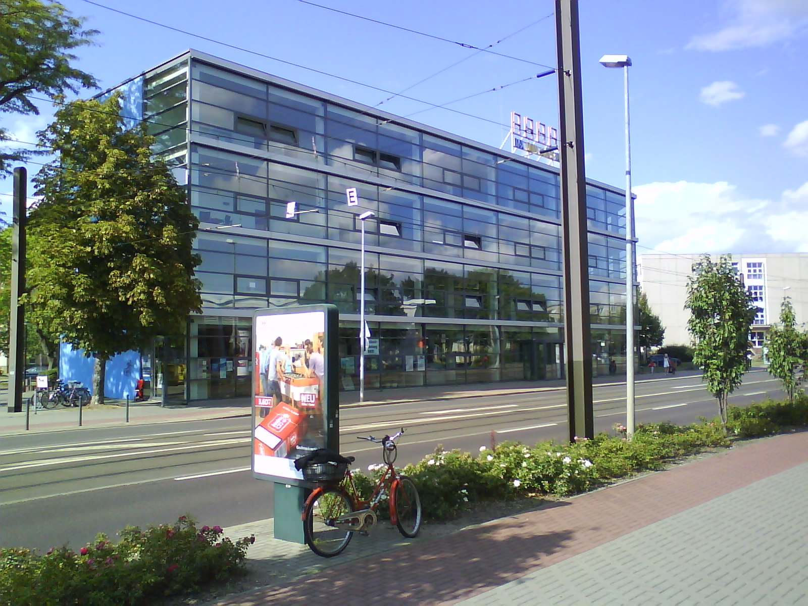 wirtschaftswissenschaftliche fakultät uni magdeburg